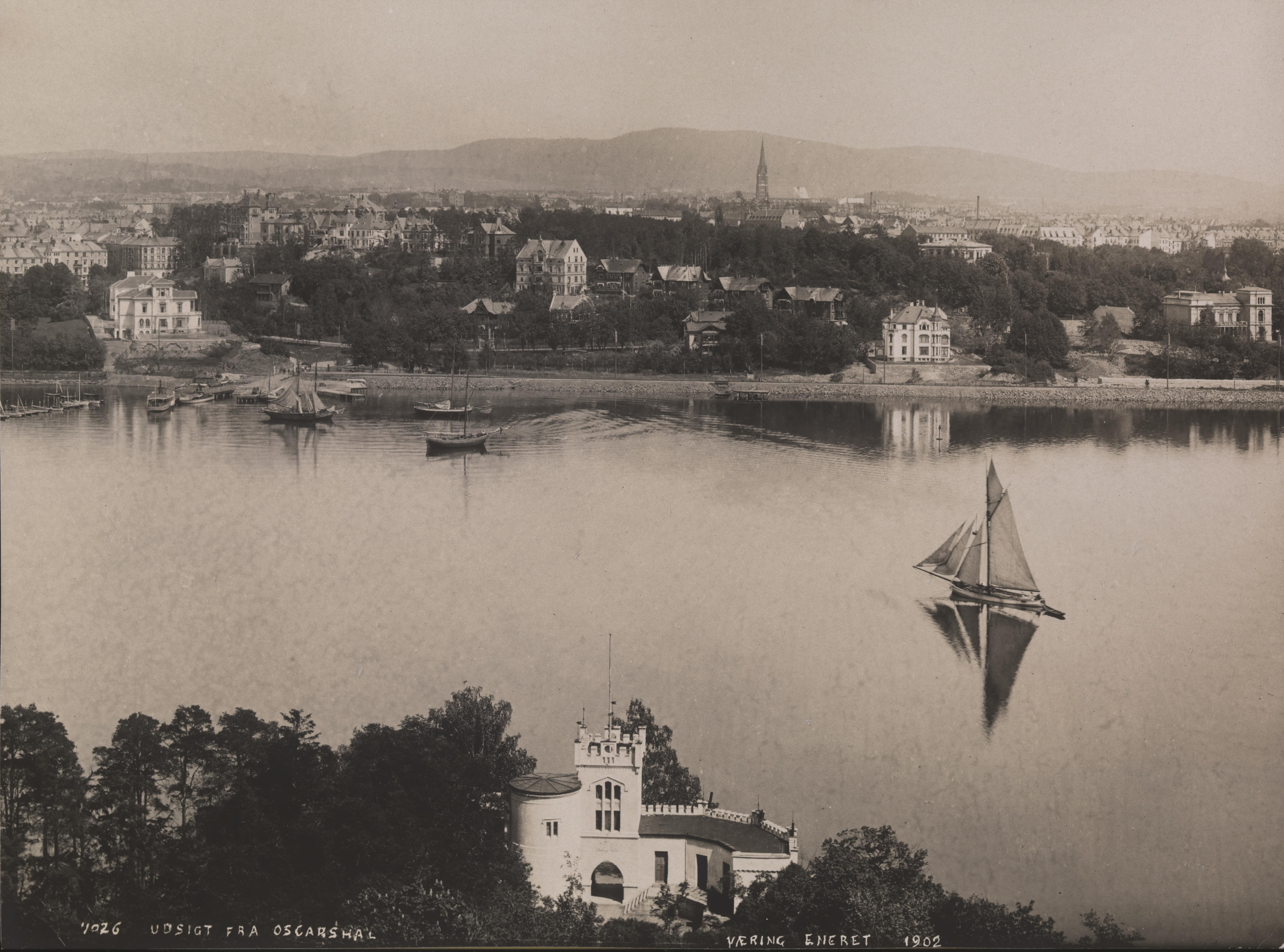 Bildet er hentet fra Nasjonalbibliotekets bildesamling Bygdøy, Oslo, Oslo